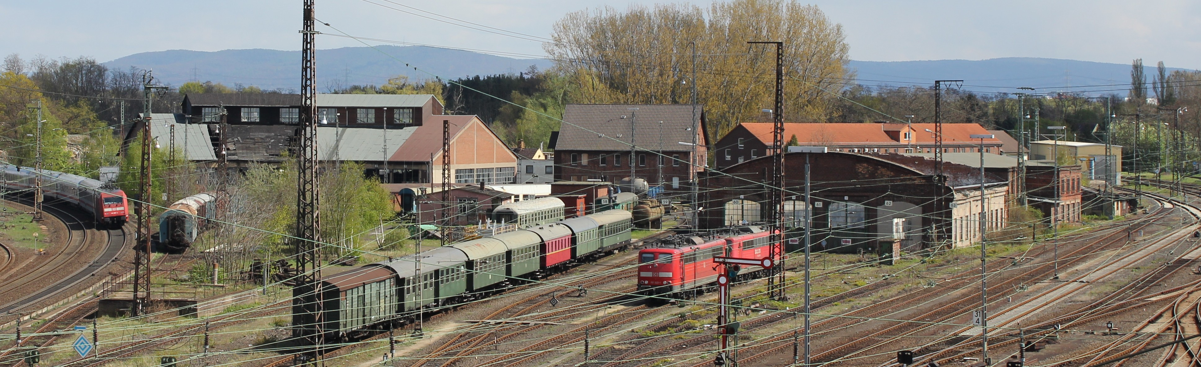 Ein Überblick über das Bw Hanau mit allen erhaltenen Gebäuden.